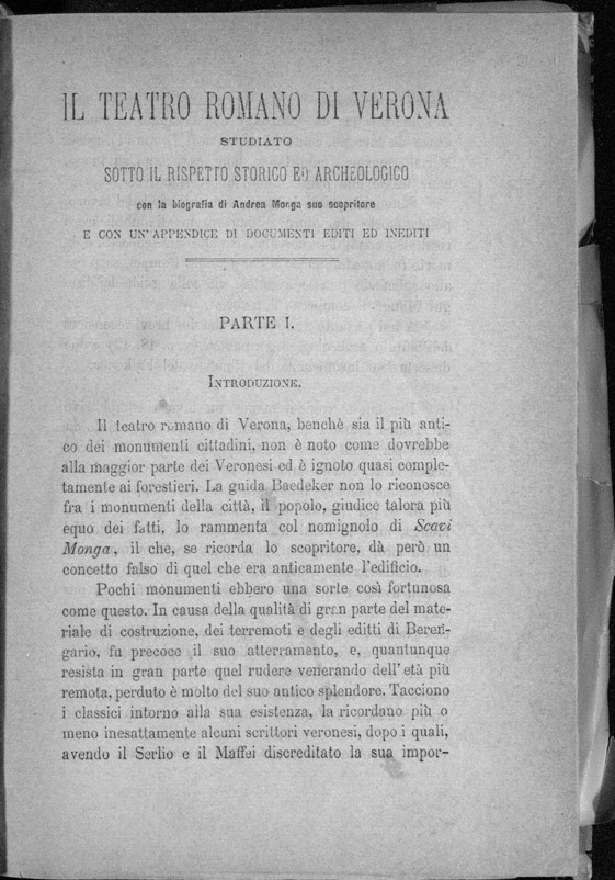 Incipit